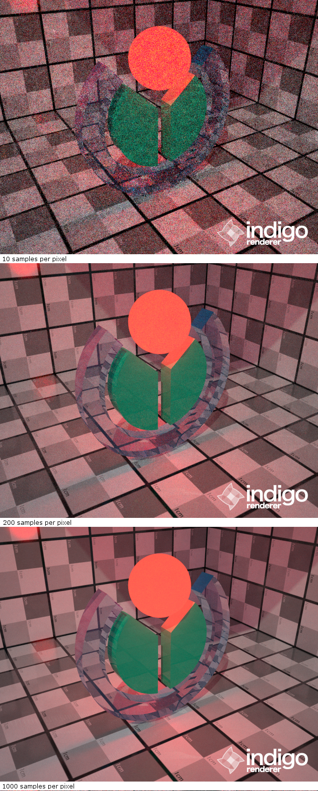 Vergleich eines mit Indigo gerenderten Bildes nach verschiedenen Zeitabständen. Als Beispiele wurden die Bilder bei 10 samples per pixel, 200 samples per pixel und 1000 samples per pixel (von oben nach unten) gewählt. Als Beispielmotiv wurde das Wikimedia-Logo verwendet, in einem texturierten Würfel und mit der roten Kugel als Lichtquelle. Die Ursprungsdatei wurde mit Blender 2.45.15 erstellt und exportiert.